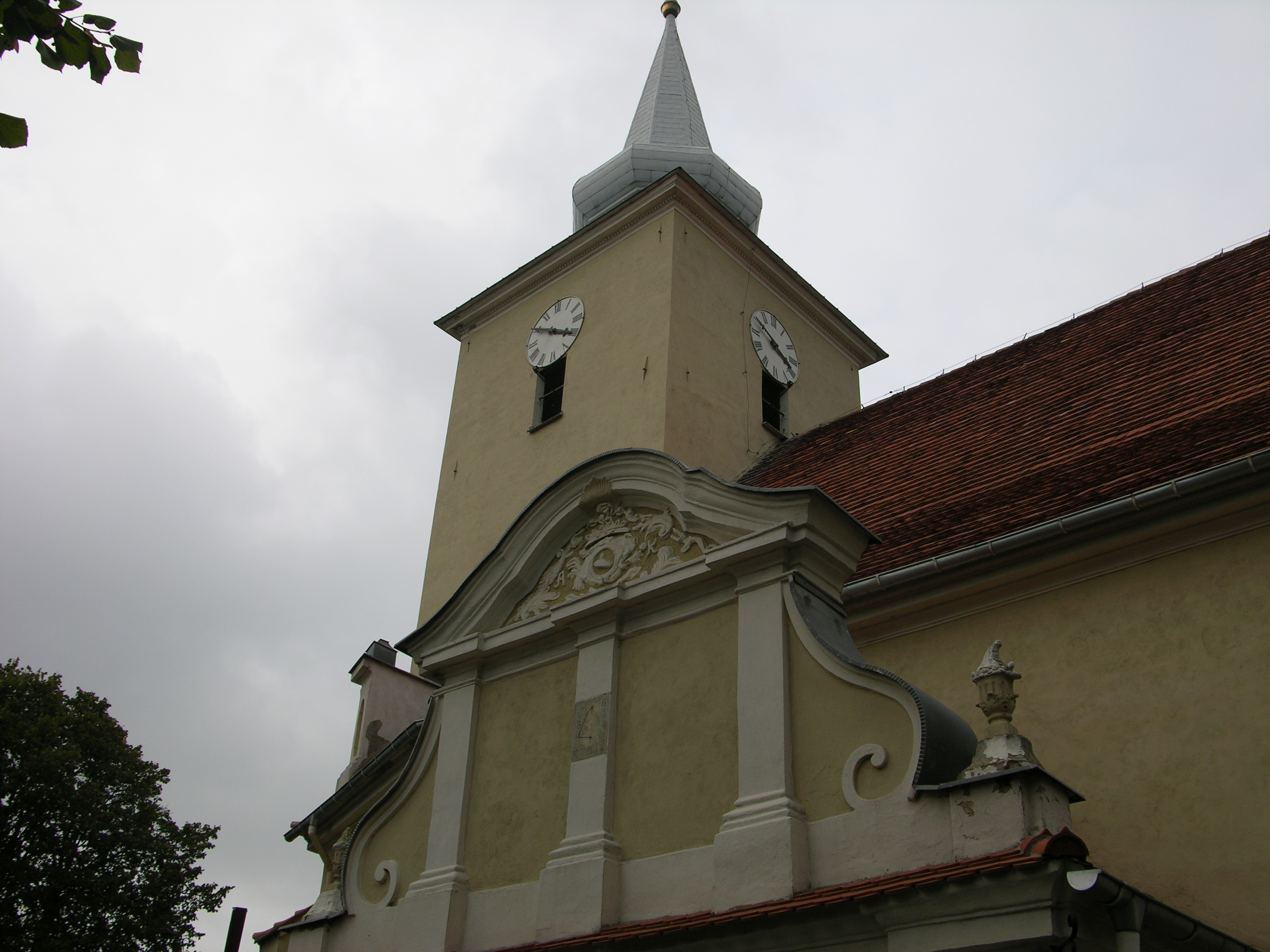 Kościół w Ostrorogu - widok od strony płd, kruchta z 1776r., na kruchcie zegar słoneczny, litery A.K. - Adam Kwilecki, herb Śreniawa i rok 1776